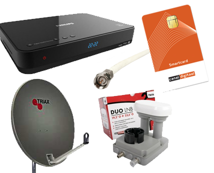 Eigen foto's. Met behulp van Photoshop bewerkt.